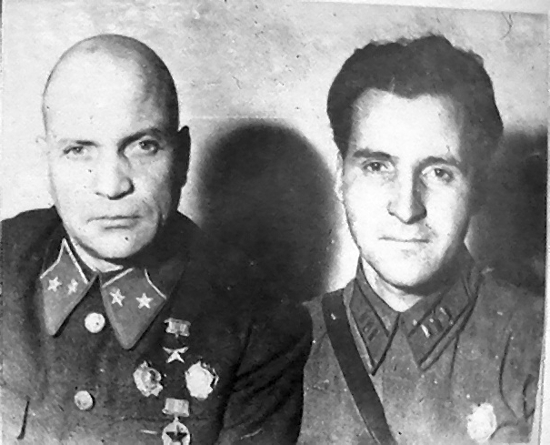 Лизюков с писателем К. М. Симоновым, 1942 год.